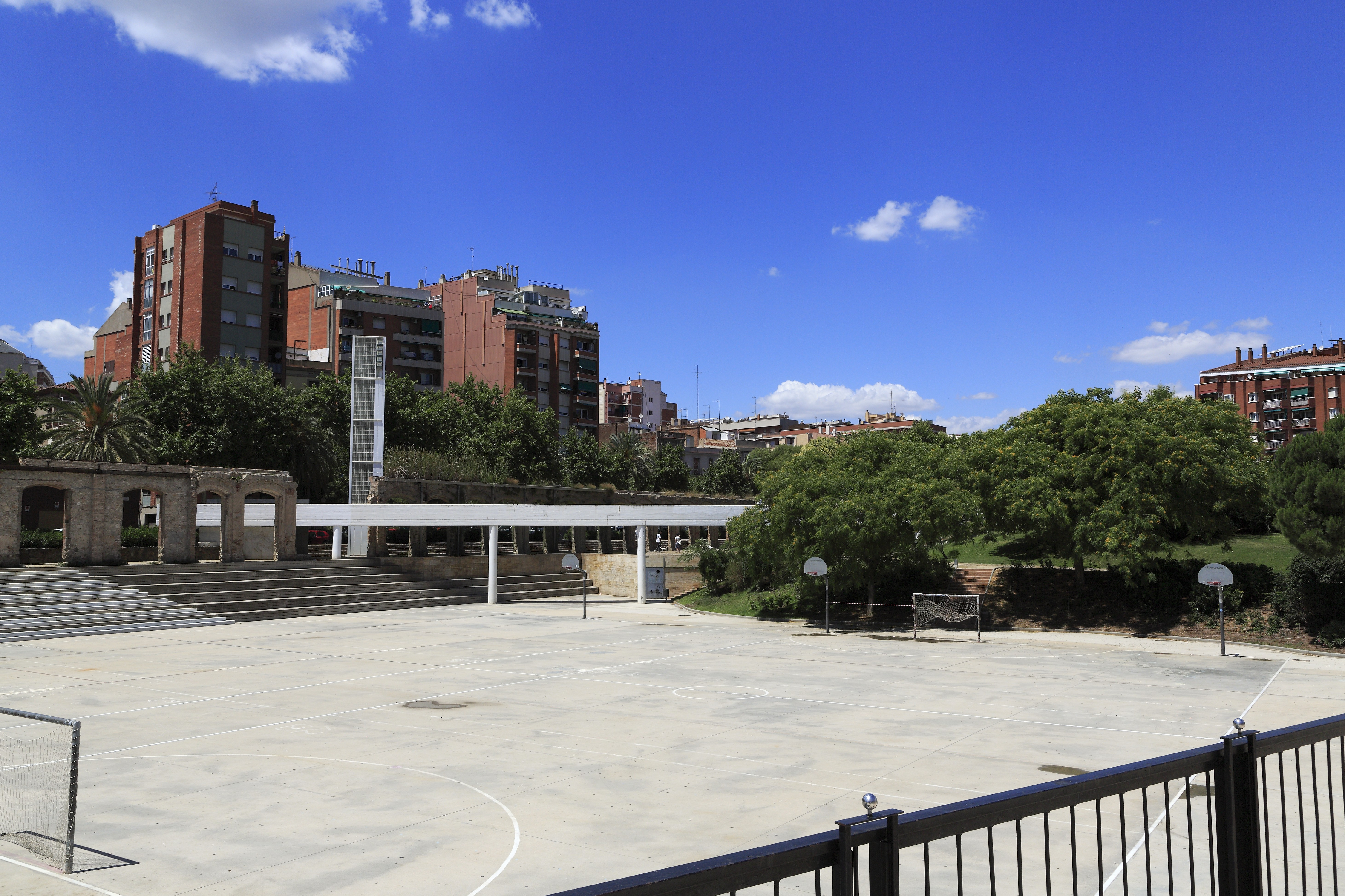 Das Parkgelände war vorher Werkstätten der Renfe.